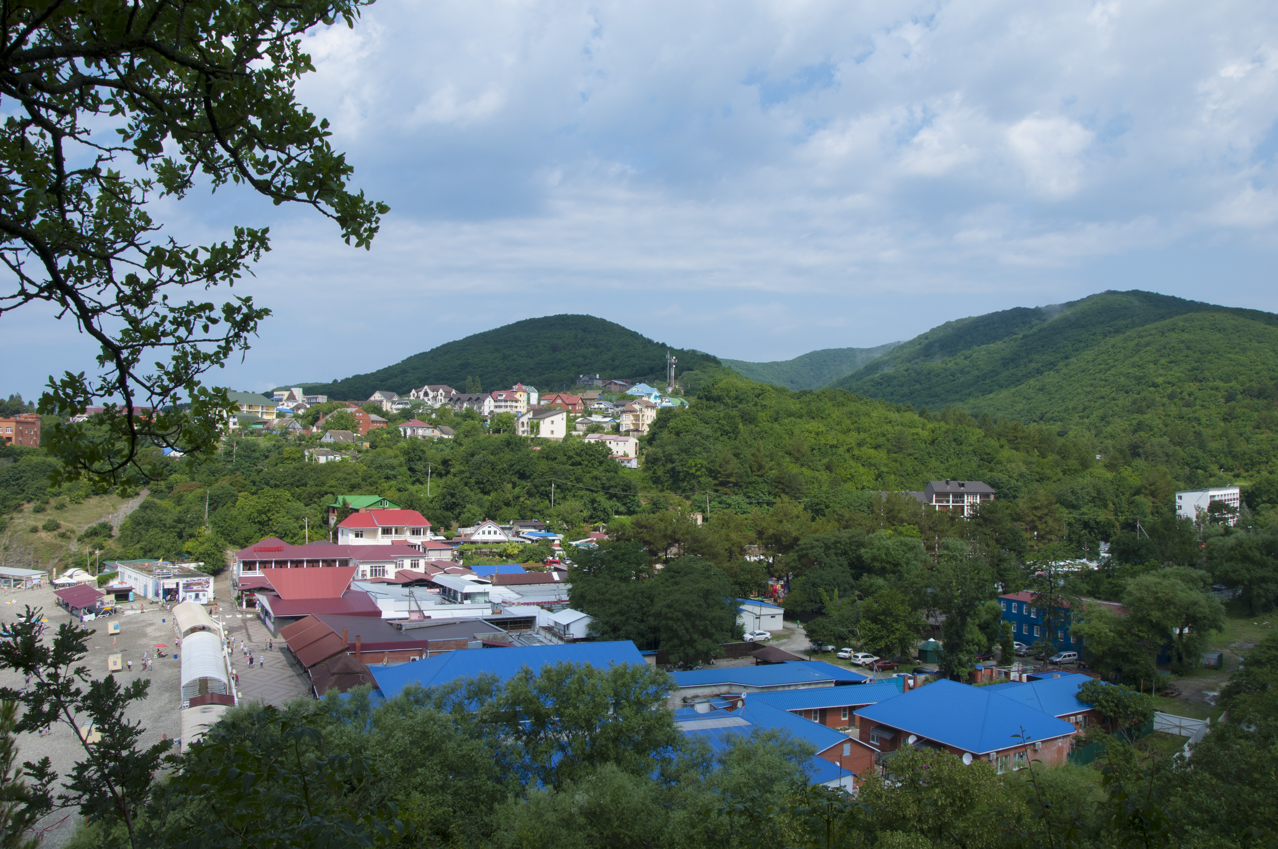 Betta, Krasnodarskiy kray, Russia, 353495